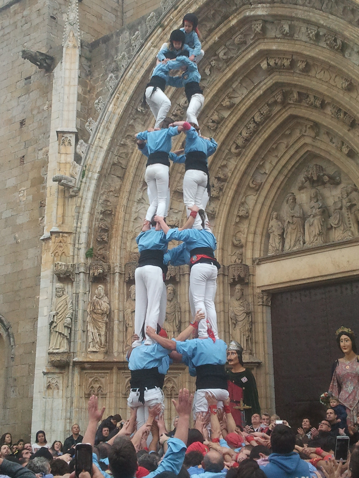 Primer 4 de 7 descarregat dels Vailets de l'Empordà, el dia del seu bateig a Castelló d'Empúries.